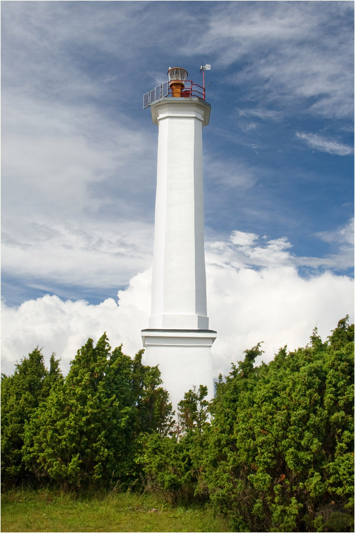 Sõmeri tuletorn